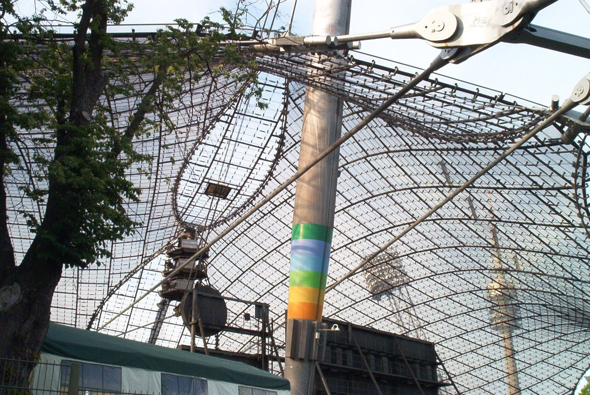 Olympiastadion München (1972)